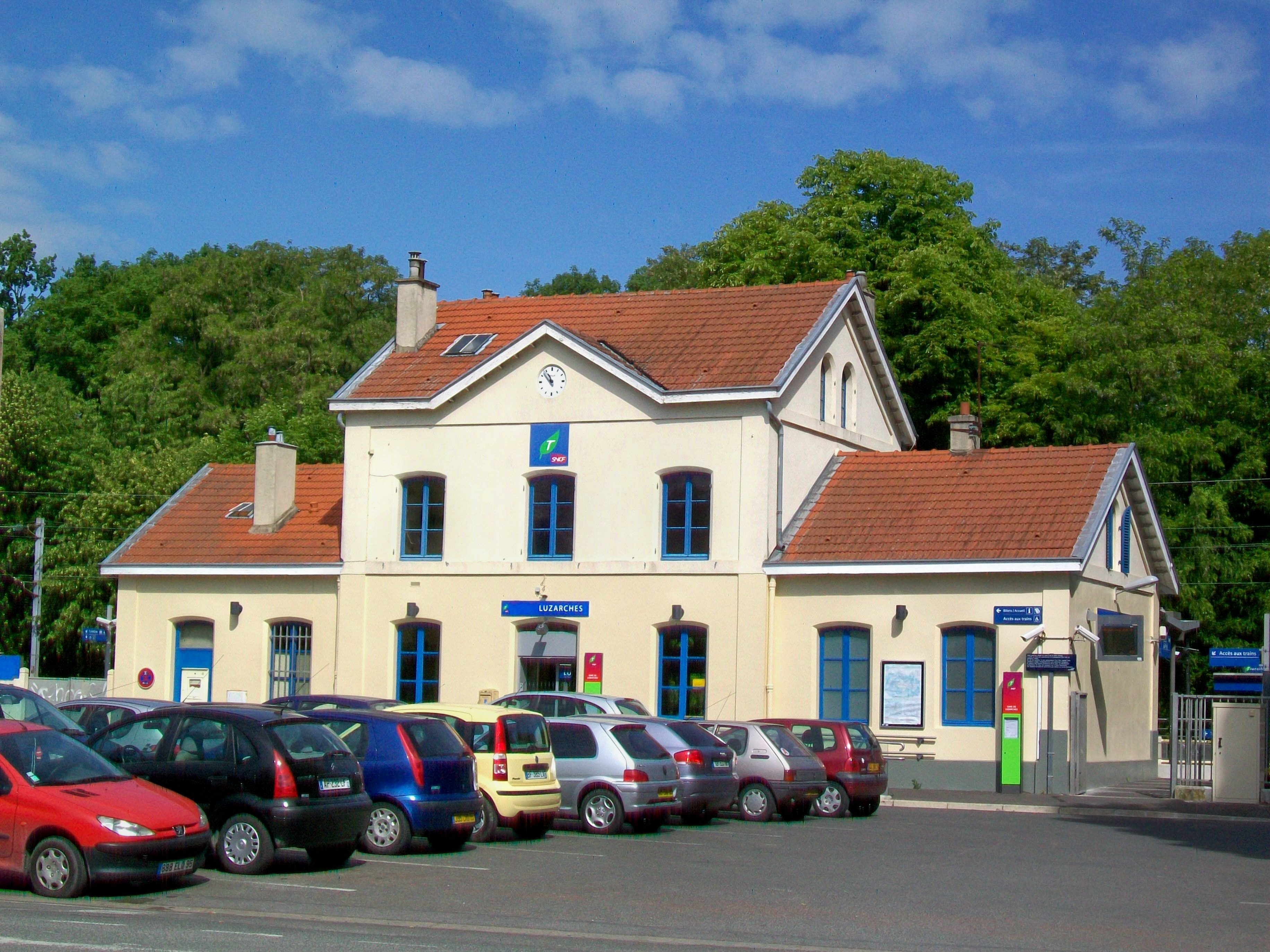 Le bâtiment voyageurs après sa rénovation en 2010 à l'occasion de l'arrivée du Francilien (Z 50000), portant notamment sur l'accès sans barrières vers le quai principal et l'intérieur du bâtiment, ainsi que sur le système d'information des voyageurs.